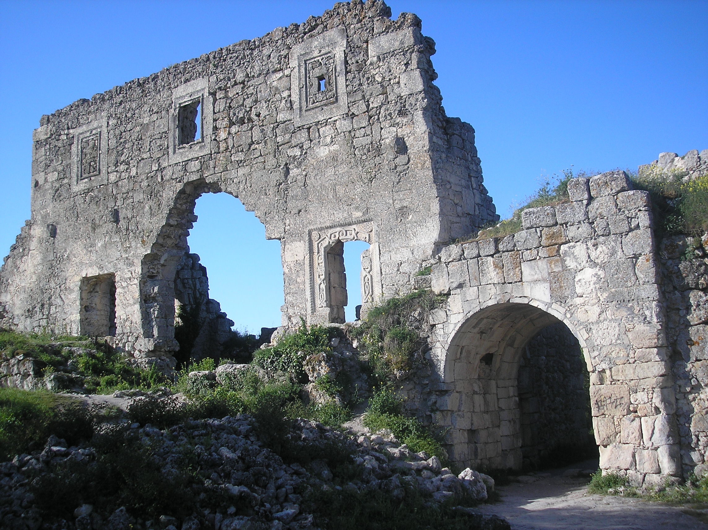 Печерні міста «Мангуп», Бахчисарайський район Бахчисарайський район, Красномакська с/р, с. Ходжа-Сала, гора Мангуп